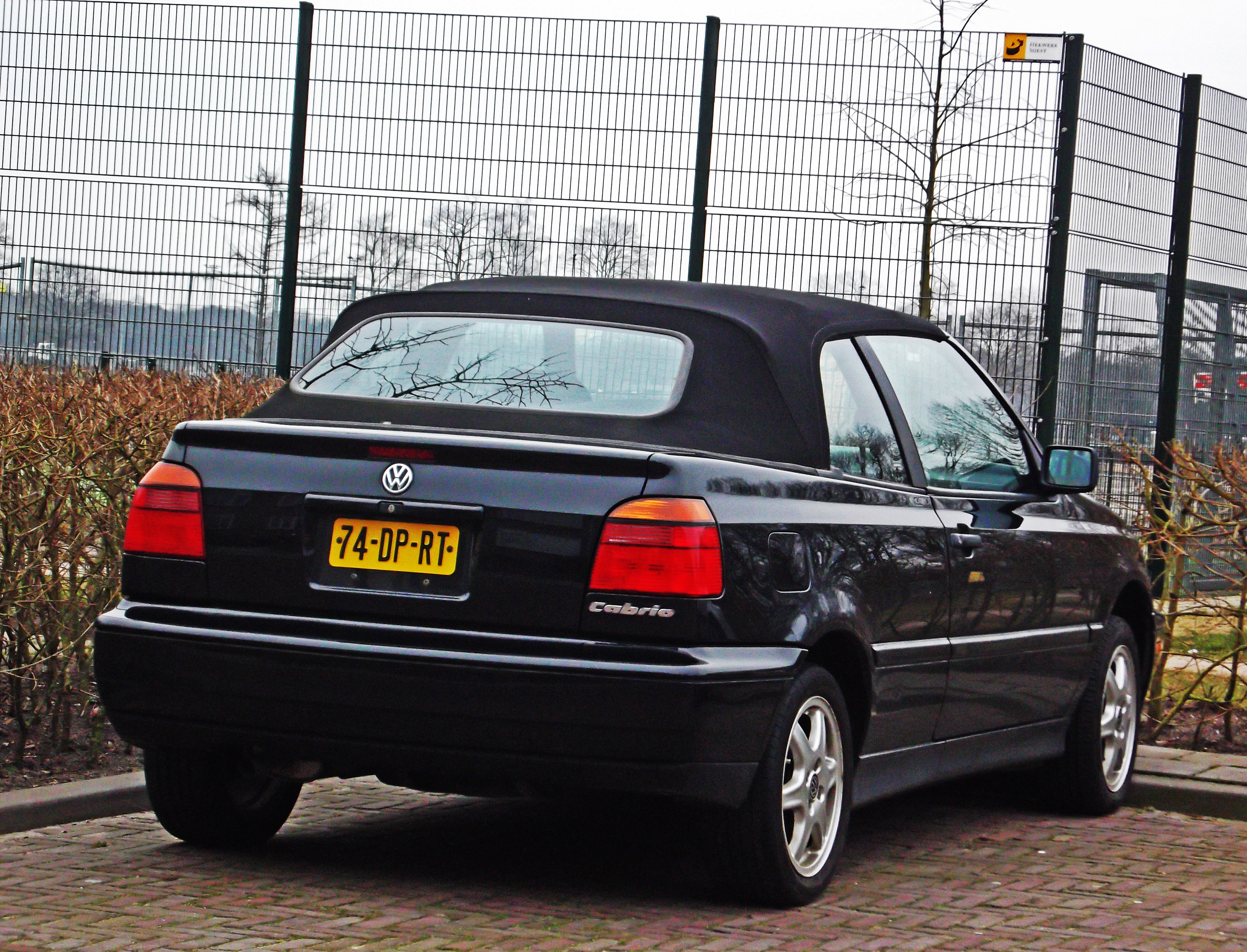 1997. US-spec.